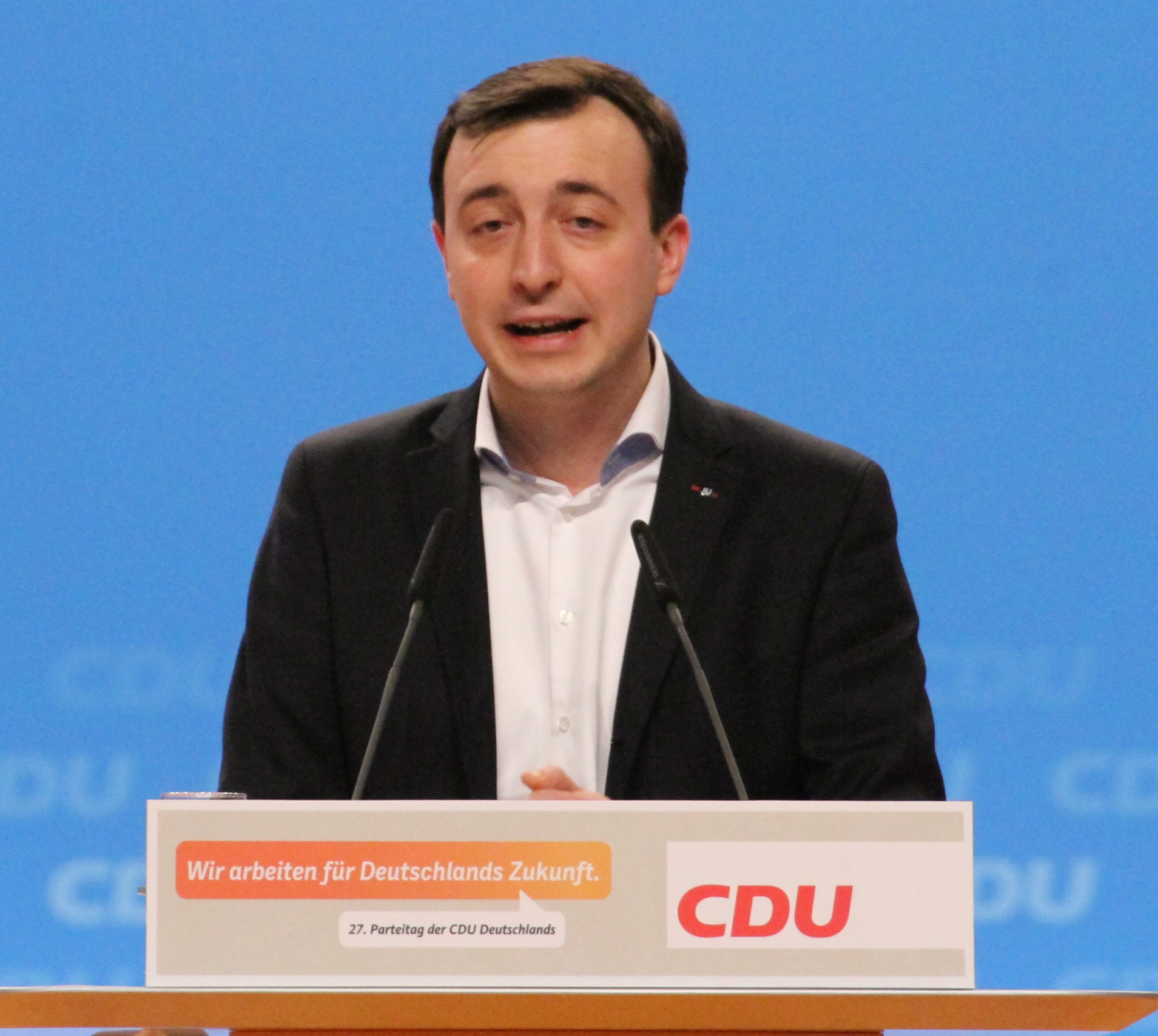 Paul Ziemiak auf dem CDU Bundesparteitag Dezember 2014 in Köln